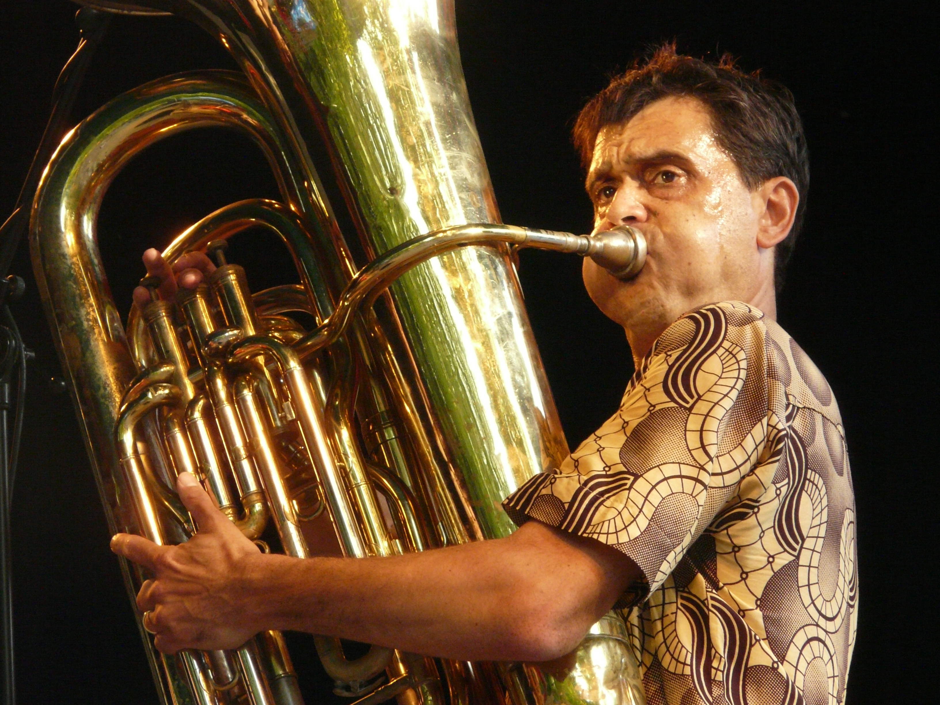 Michel Massot au sein de la formation Massot/Horba/Florizoone, lors du concert donné au Brosella Folk et Jazz 2010.